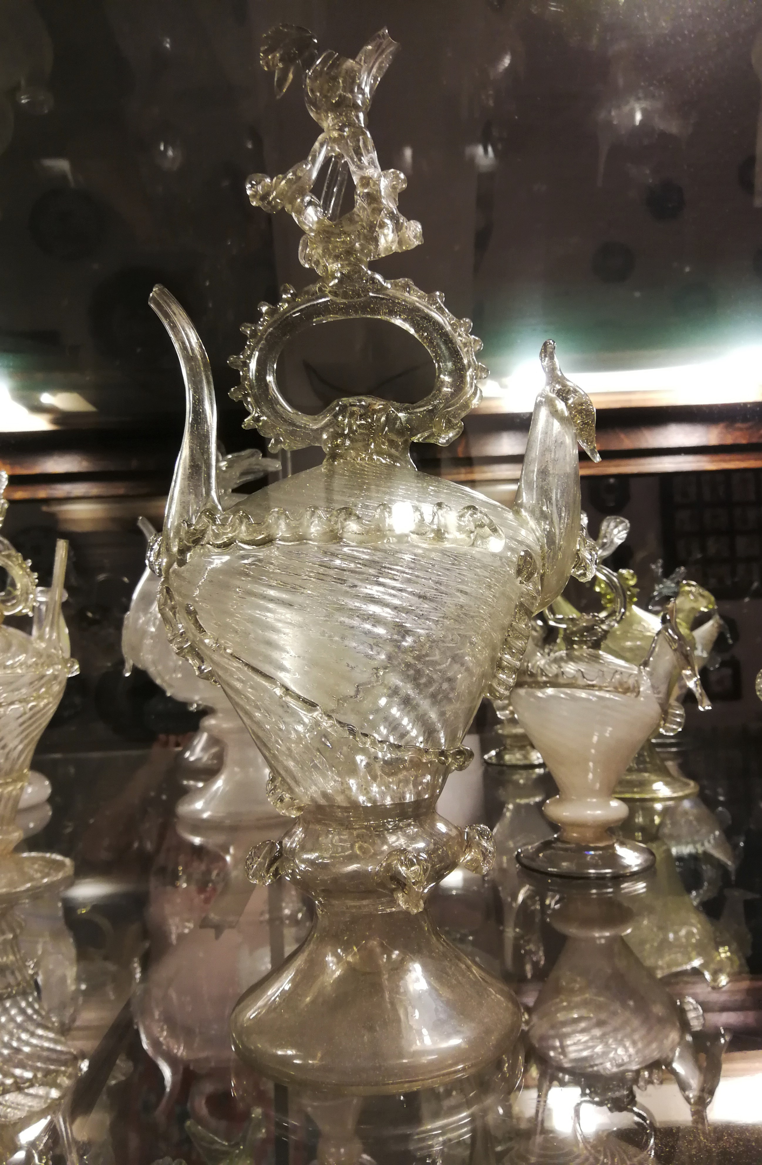 Katalanischer Hochzeits-Càntir (verzierter Schnabelkrug zum Wasser- oder Weintrinken, Ausführung für die Frau, Museo del Vidre de Perelada)